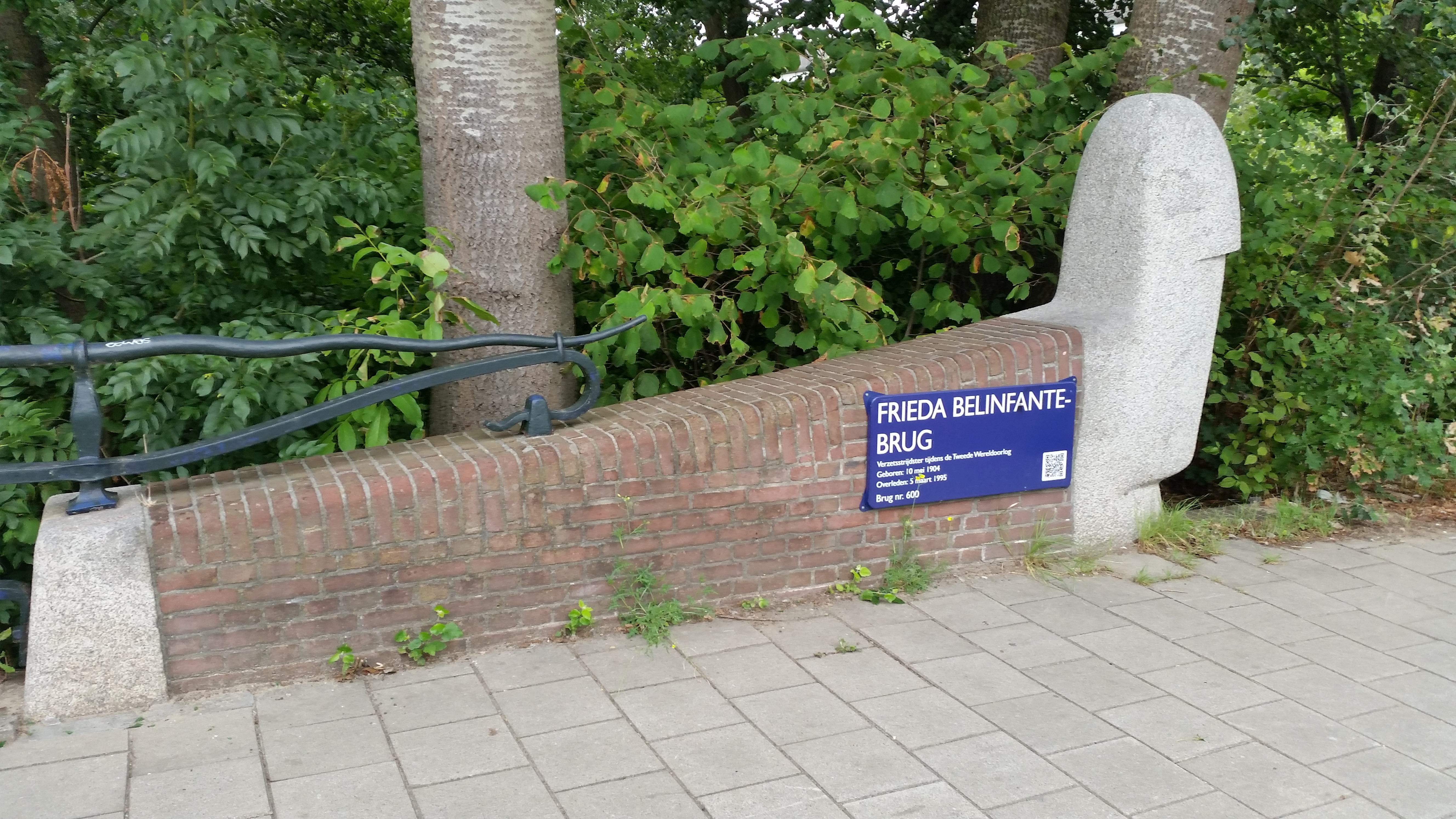 Brug 600, Frieda Belinfantebrug met beeldhouwwerk van Joost Barbiers